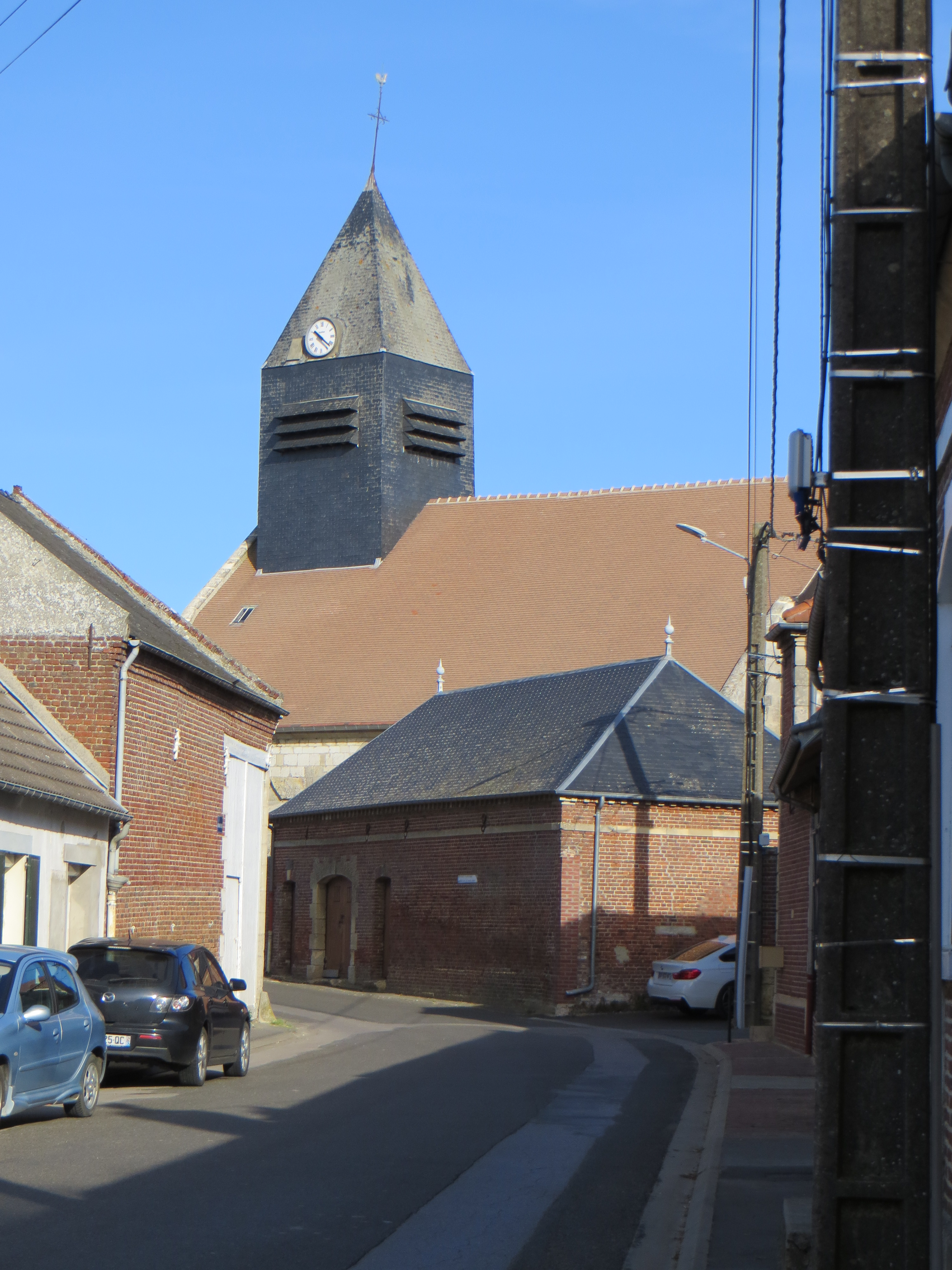 Vue générale de l'église